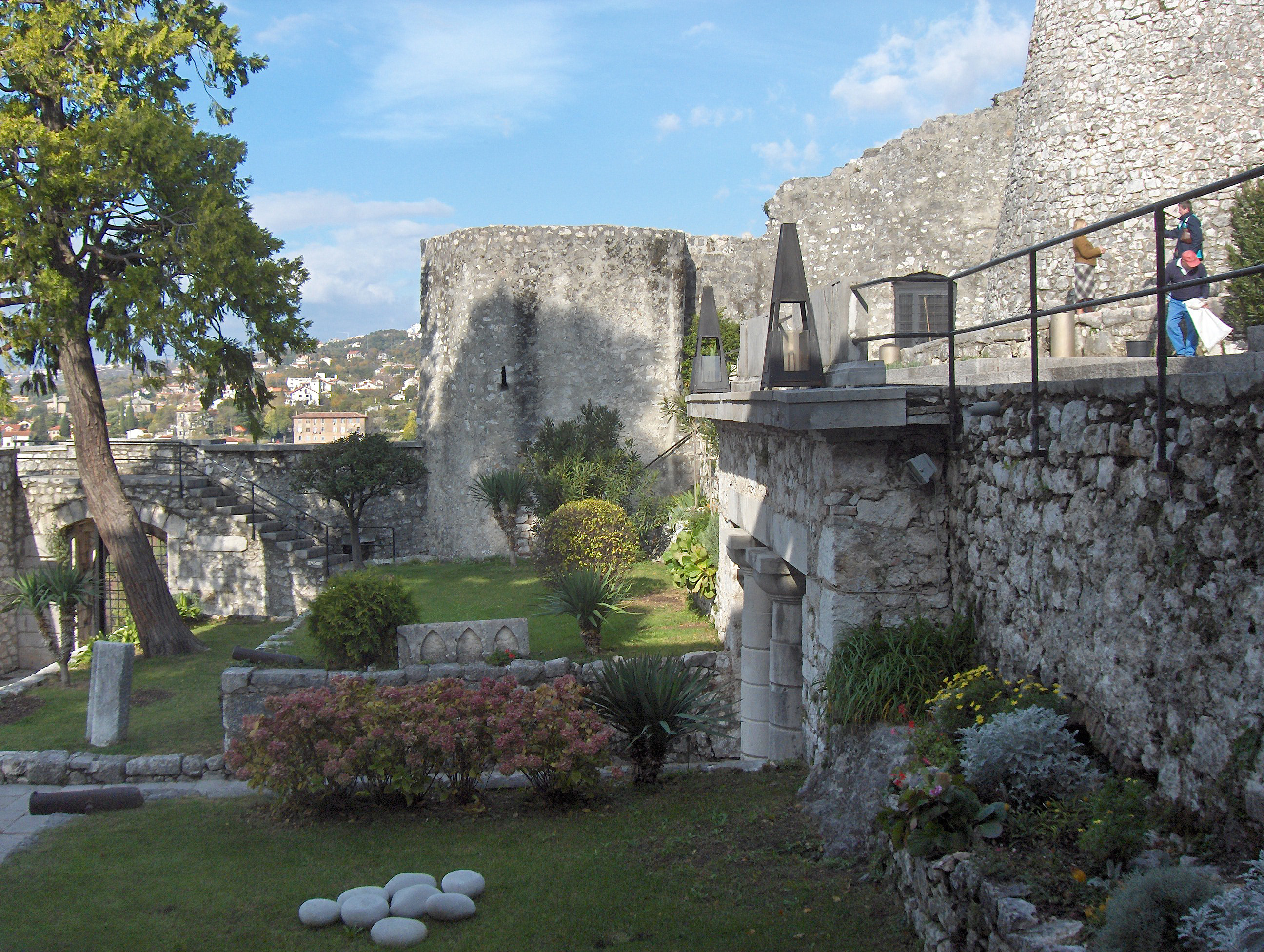 Trsat Castle, Rijeka, Croatia